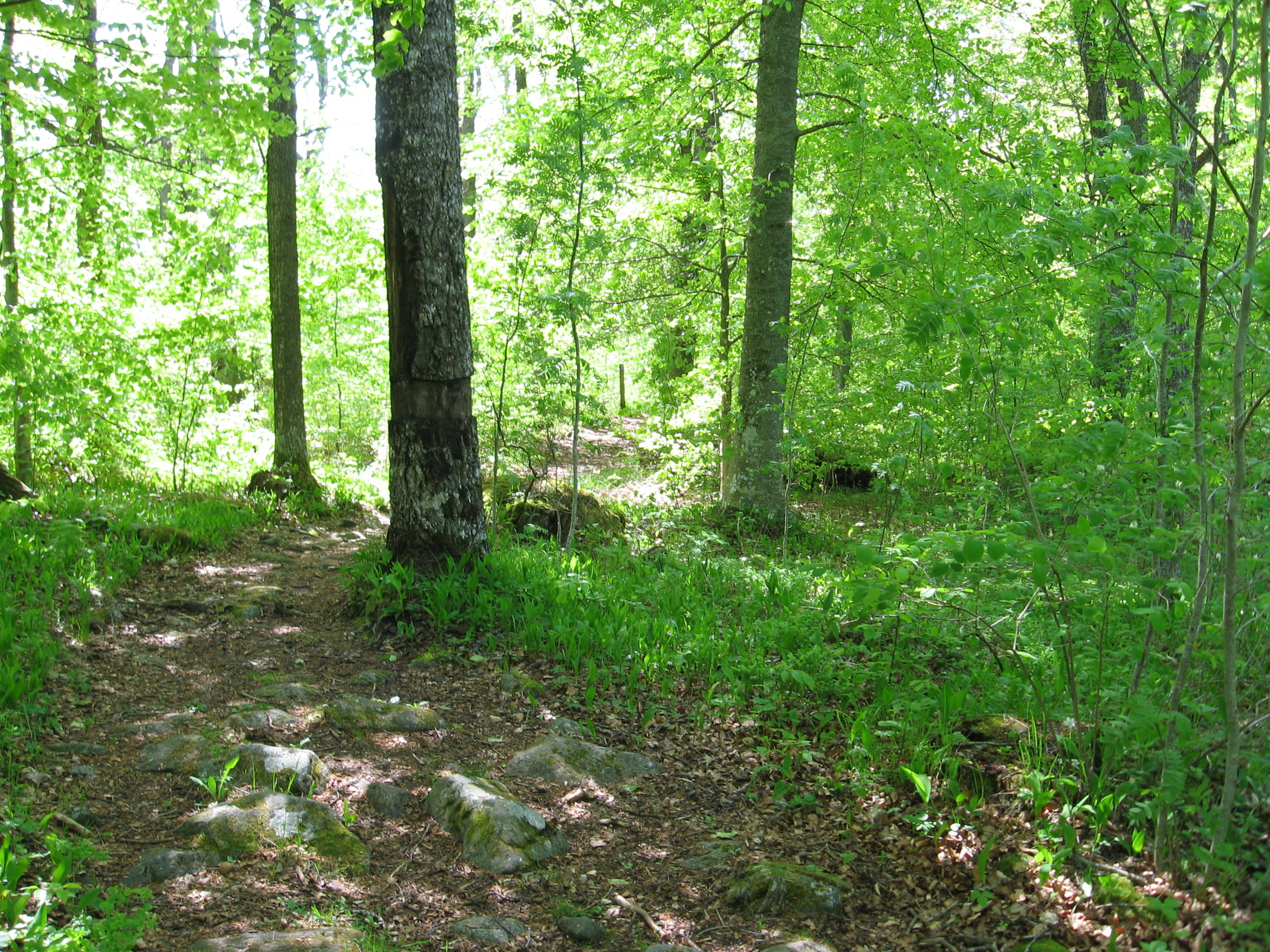 Surö bokskog i Mariestads kommun.